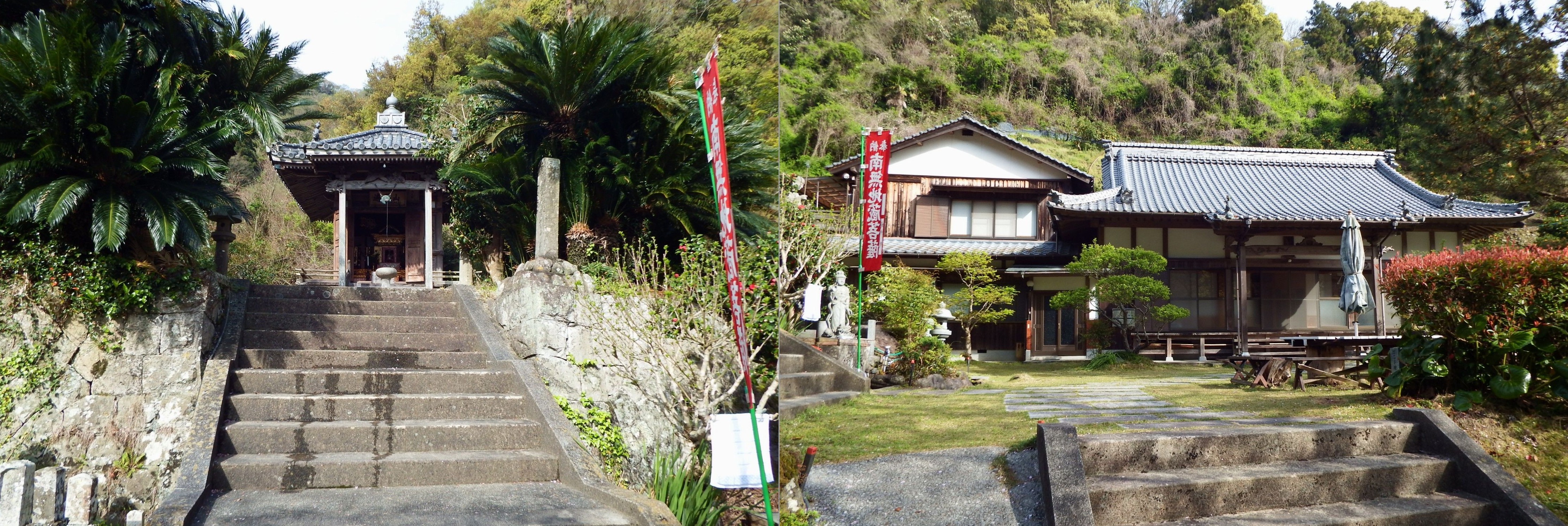 鯨大師の大師堂と本堂